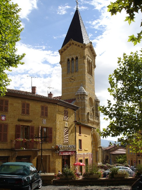 Bully (Rhône-69) : L'Eglise Saint-Polycarpe vue de la place du Château.